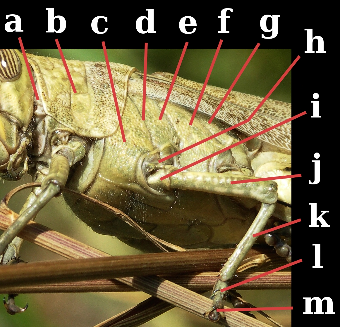 see legend below